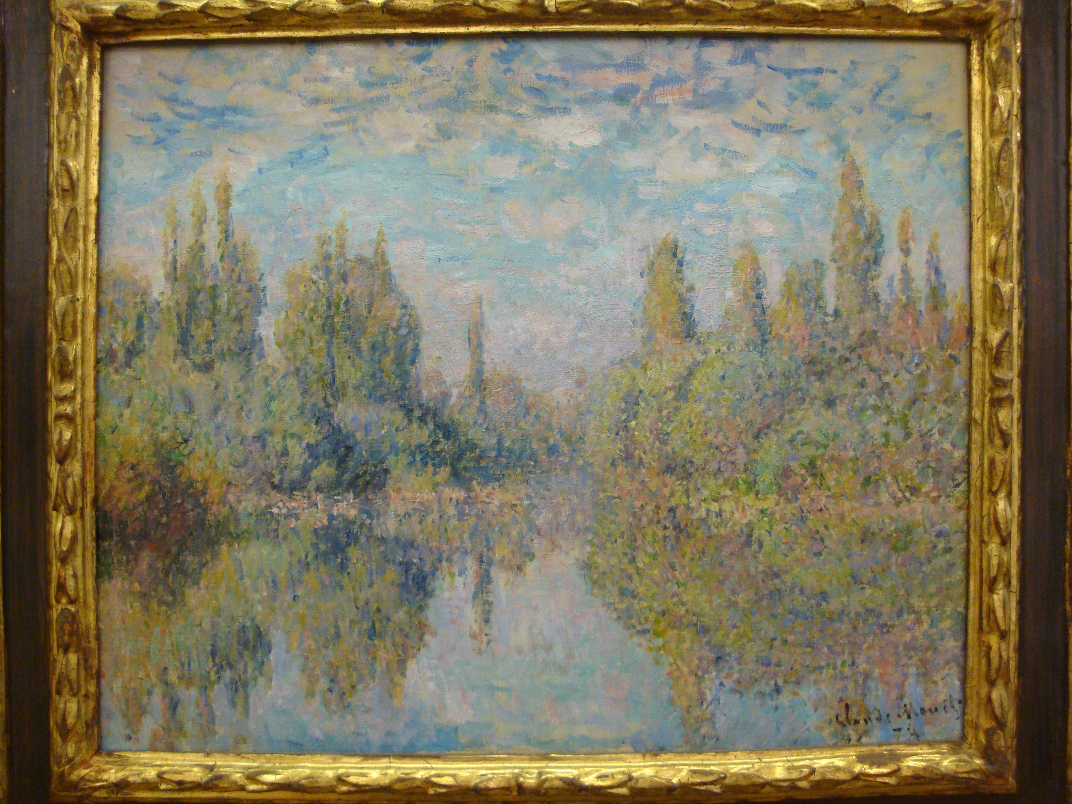 La Seine à Vétheuil - 1878 - Claude Monet